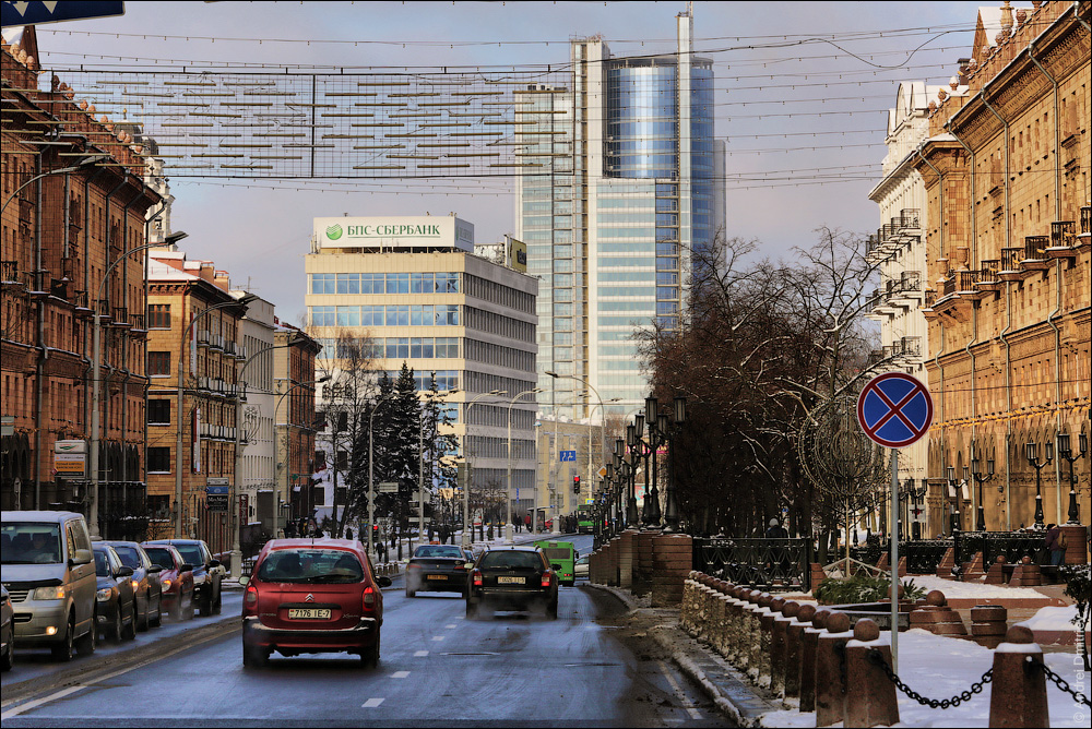 вул. Леніна ў Мінску